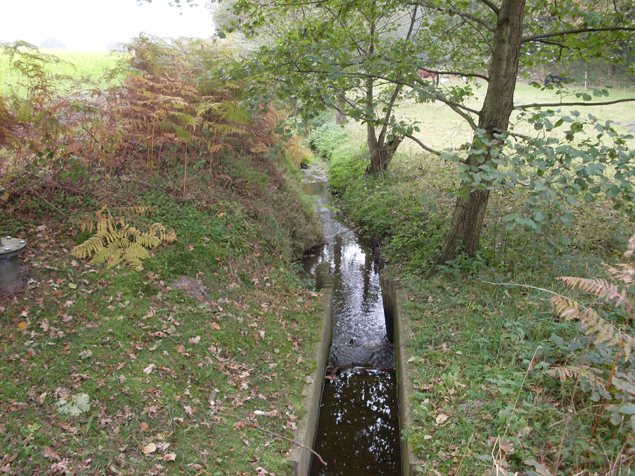 Der Sennebach im Oberlauf als Rahmke bei Stukenbrock-Senne, Abflusspegel Mittweg